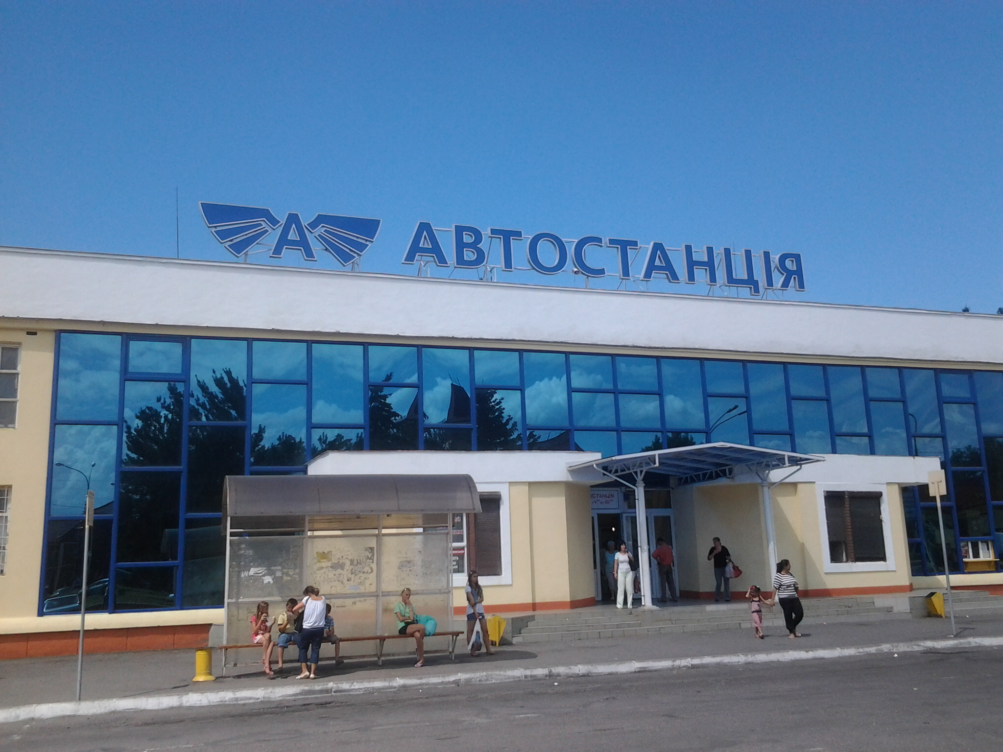 Автостанція на станційні вулиці.